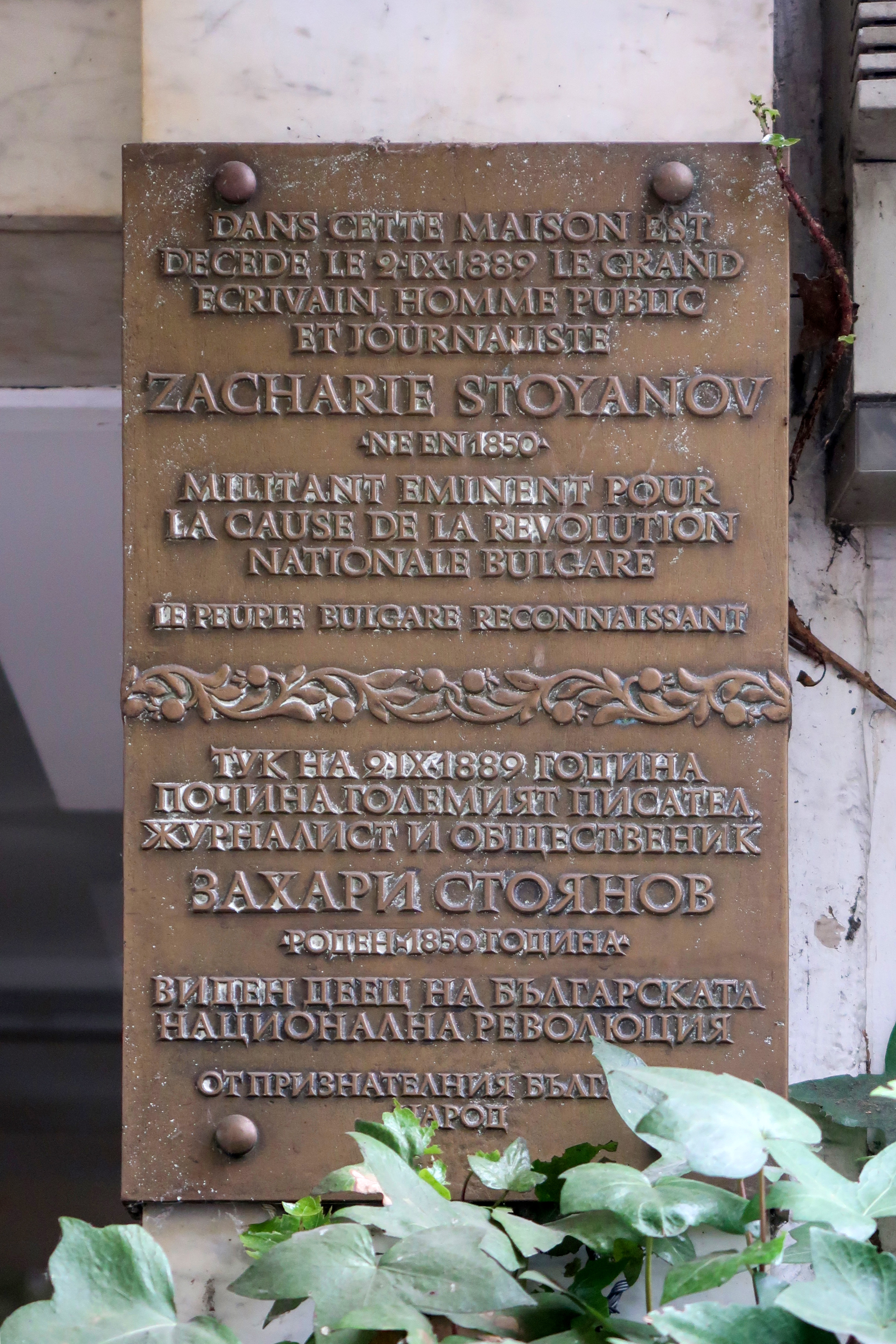 Plaque en hommage au révolutionnaire bulgare Zahari Stoyanov devant l'hôtel de Suez, 31 boulevard Saint-Michel (Paris, 5e).